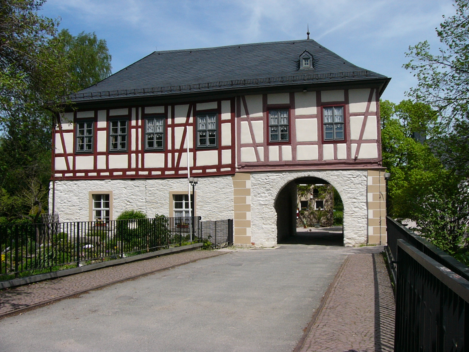 Eingang zur Schloßinsel